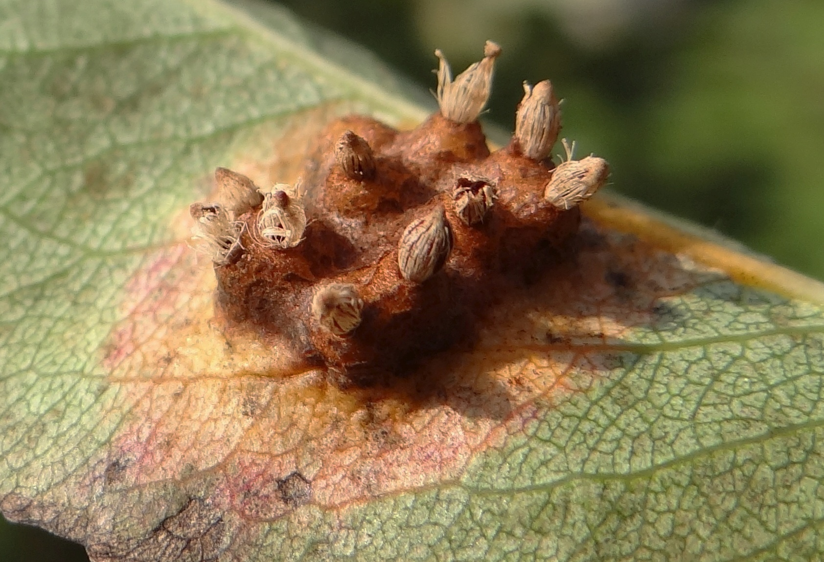 Gymnosporangium sabinae on Pyrus